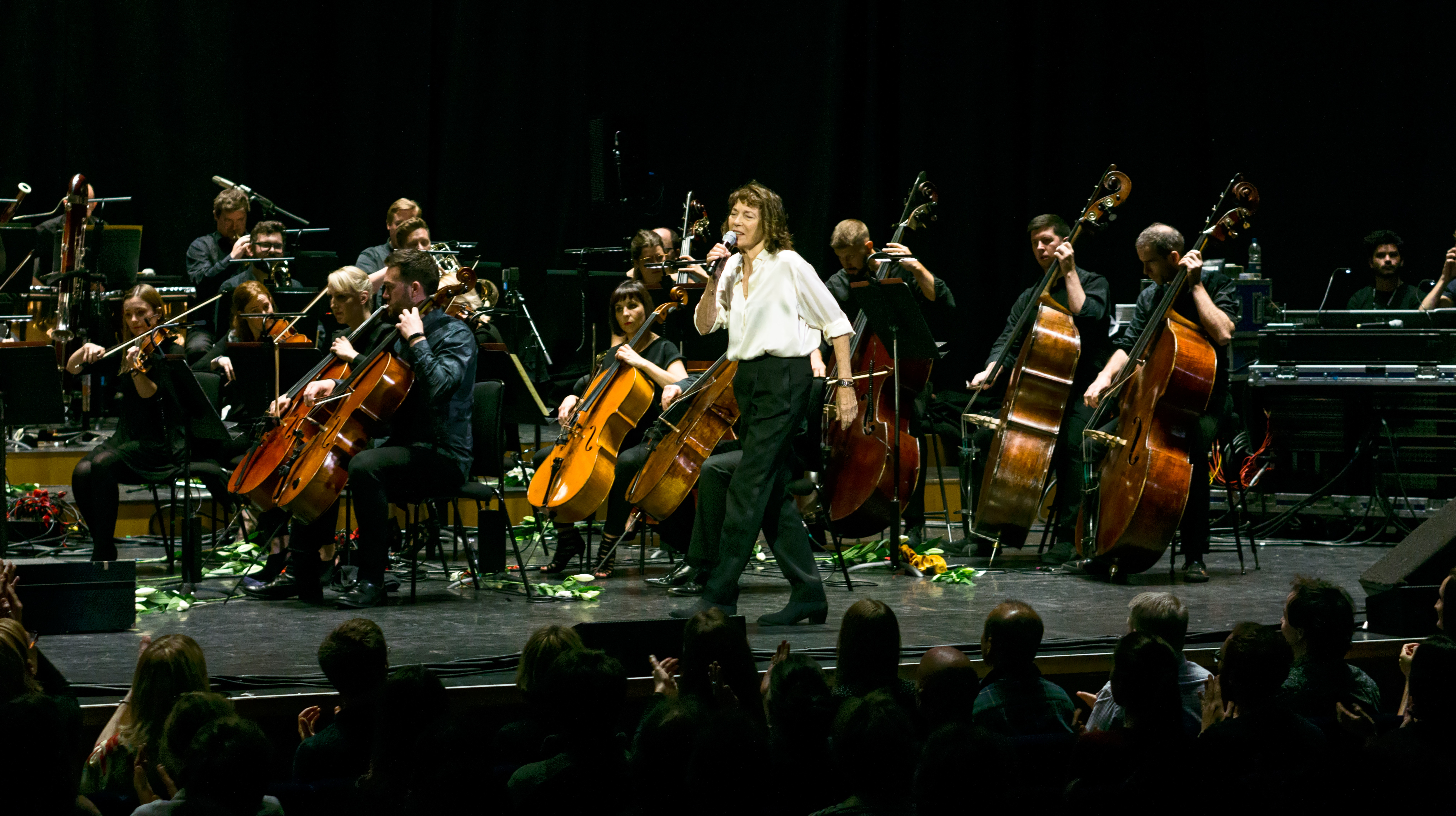 JaneBirkinBarbican-1